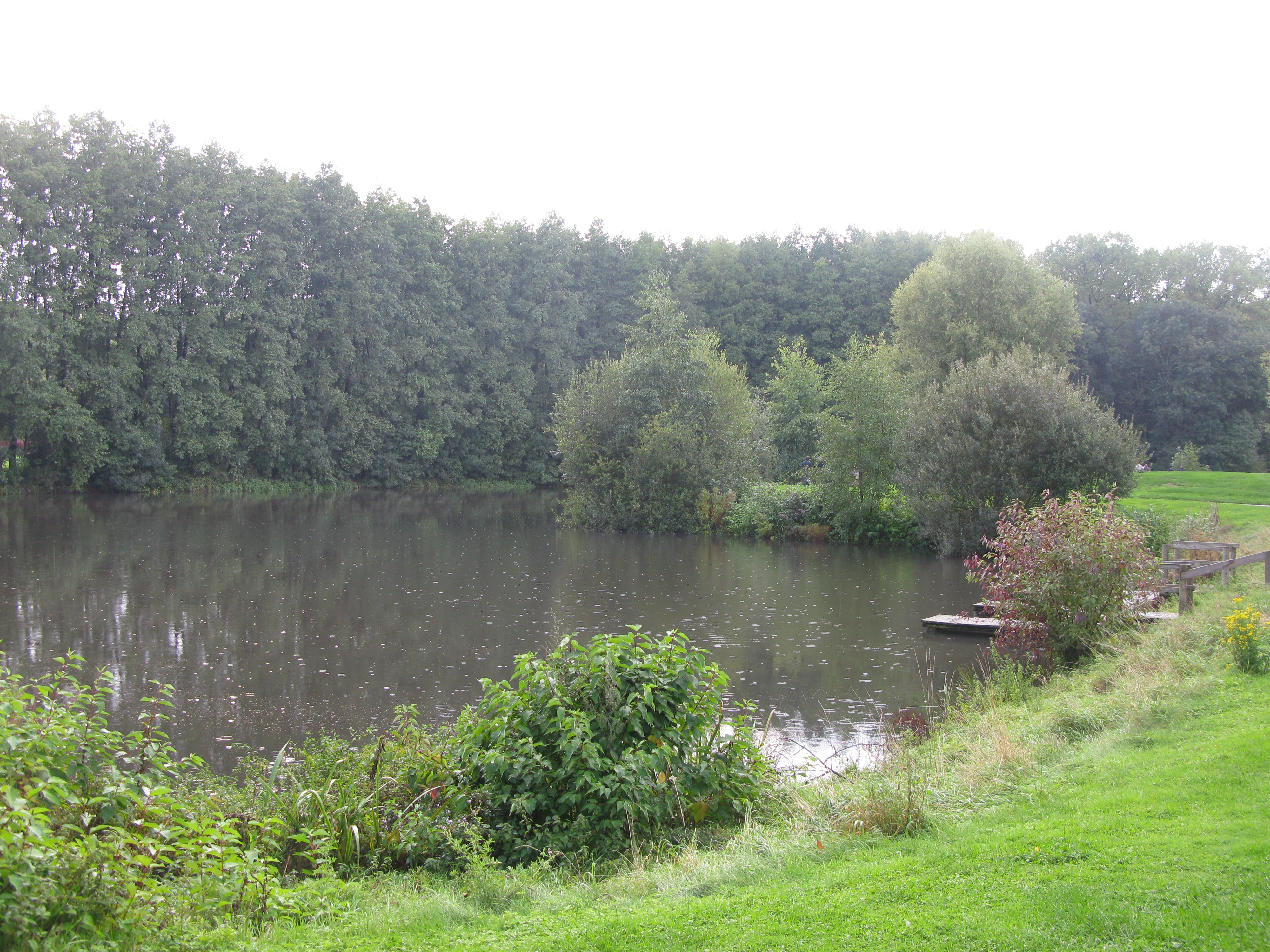 Lac de Canteleu à Villeneuve d'Ascq.